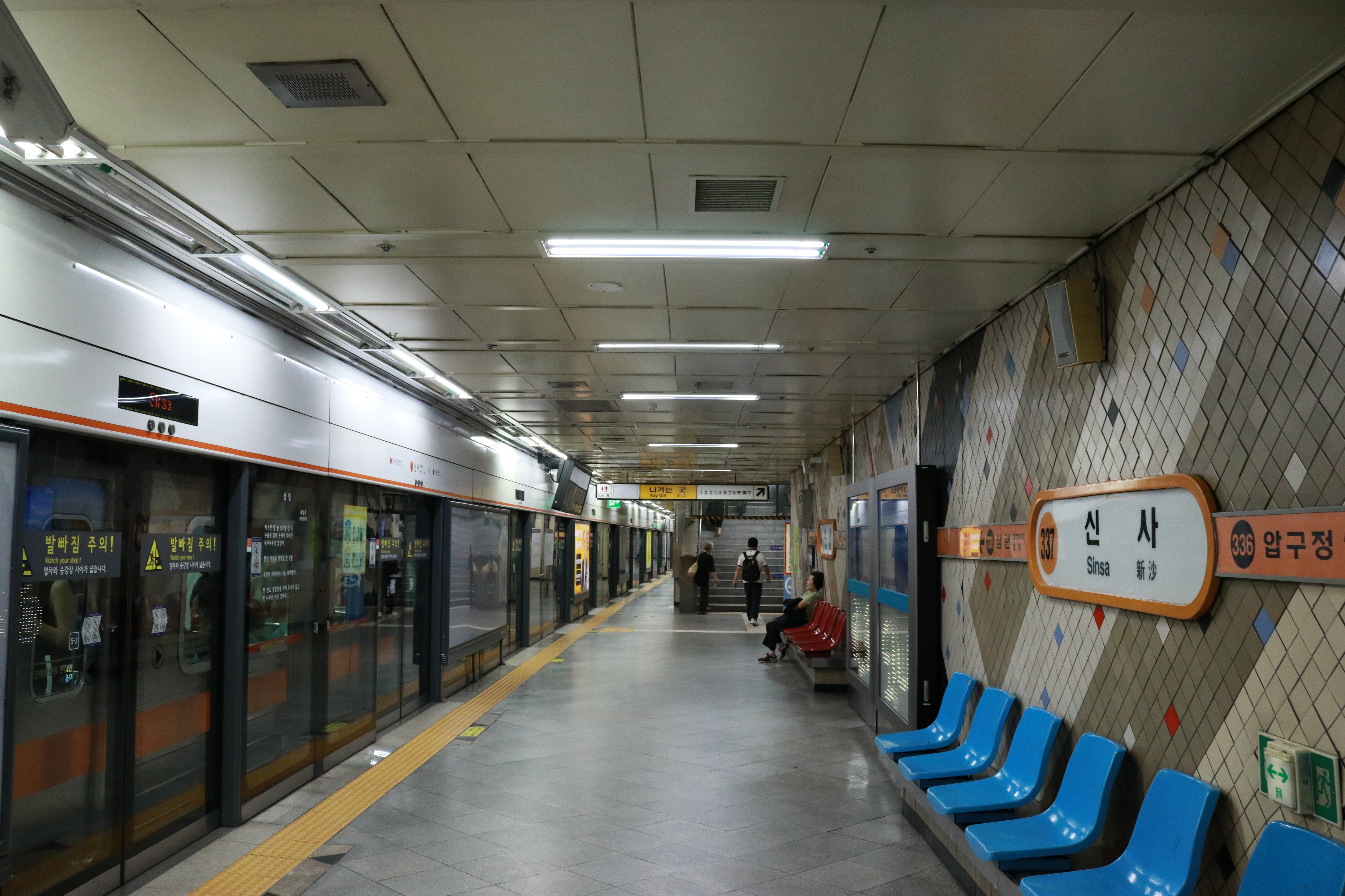 신사역 승강장